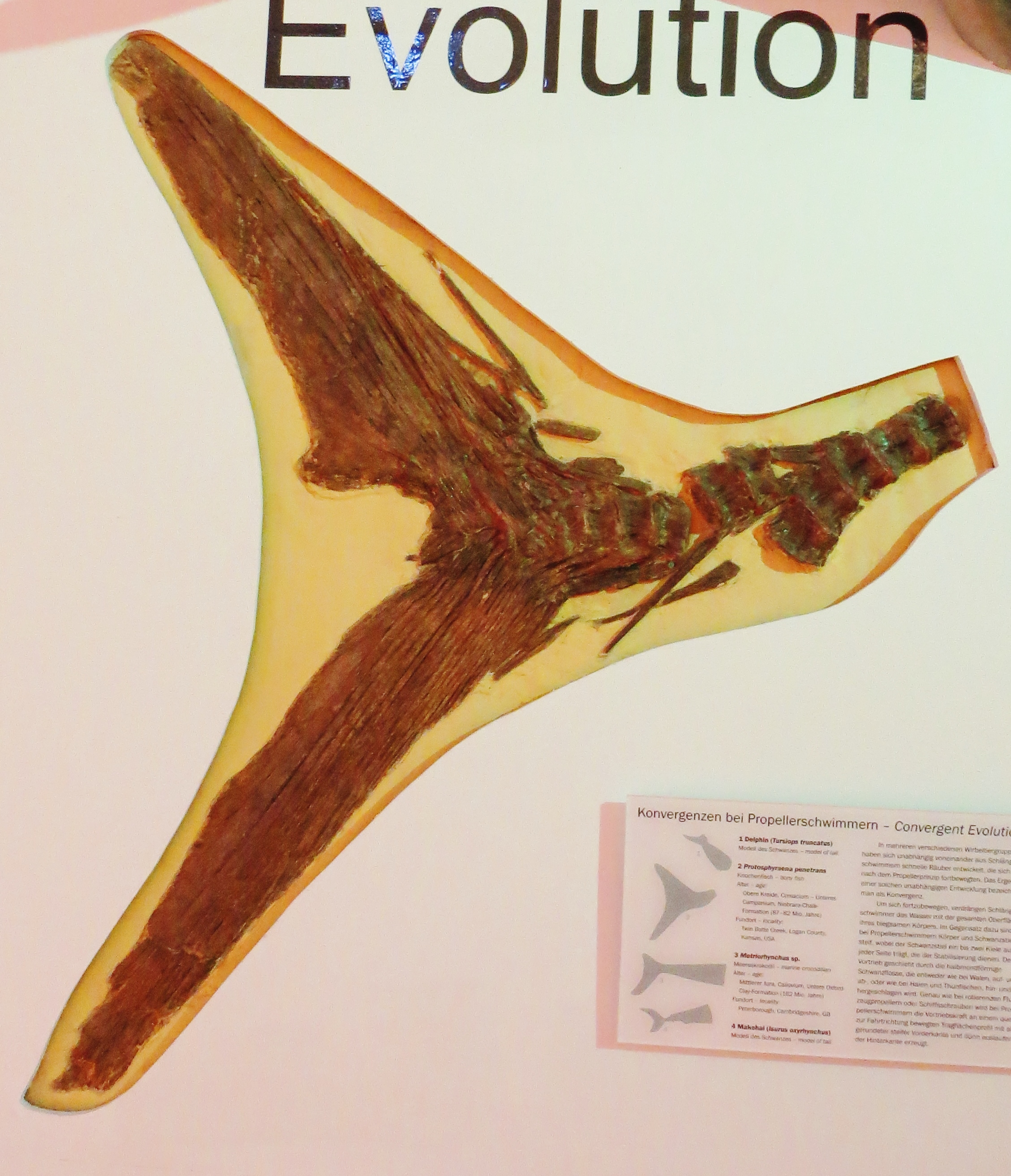 Fossil of Protosphyraena, an extinct fish- Took the picture at Museum of Paleontology, Tubingen